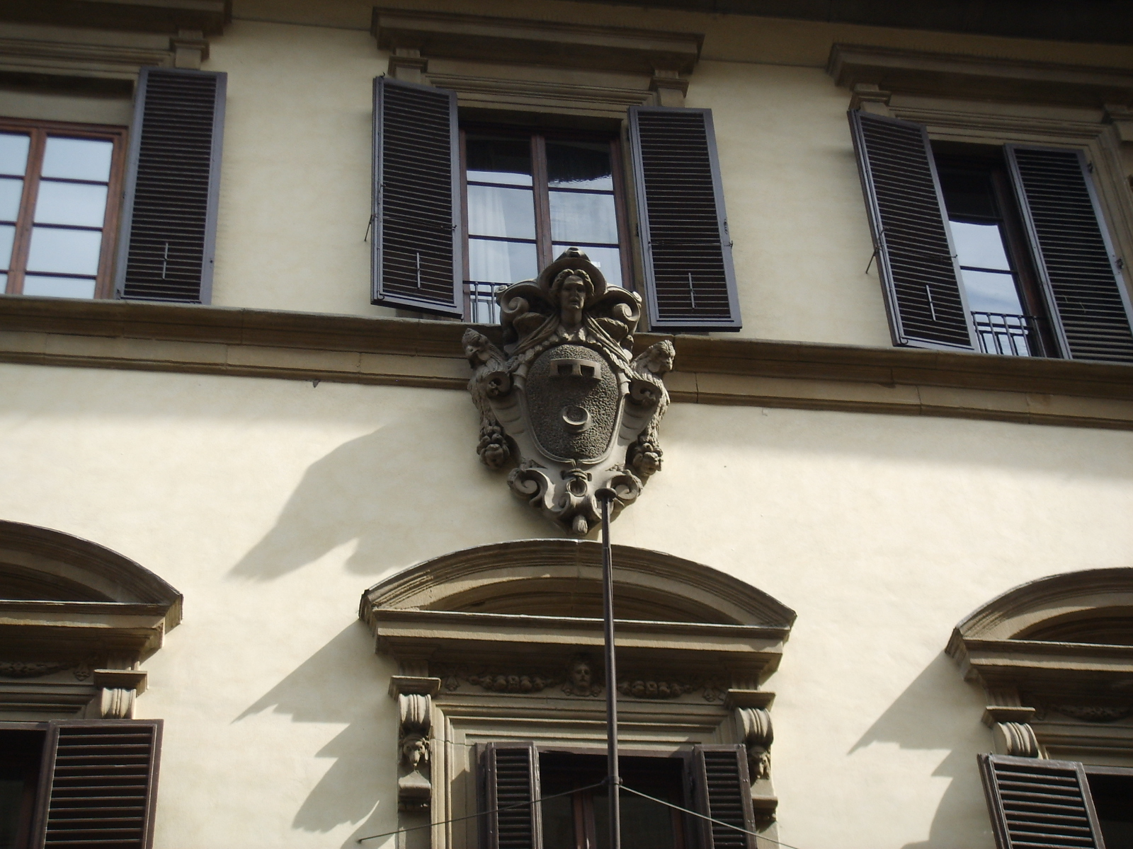 Palazzo_Capponi_Covoni, in Florence